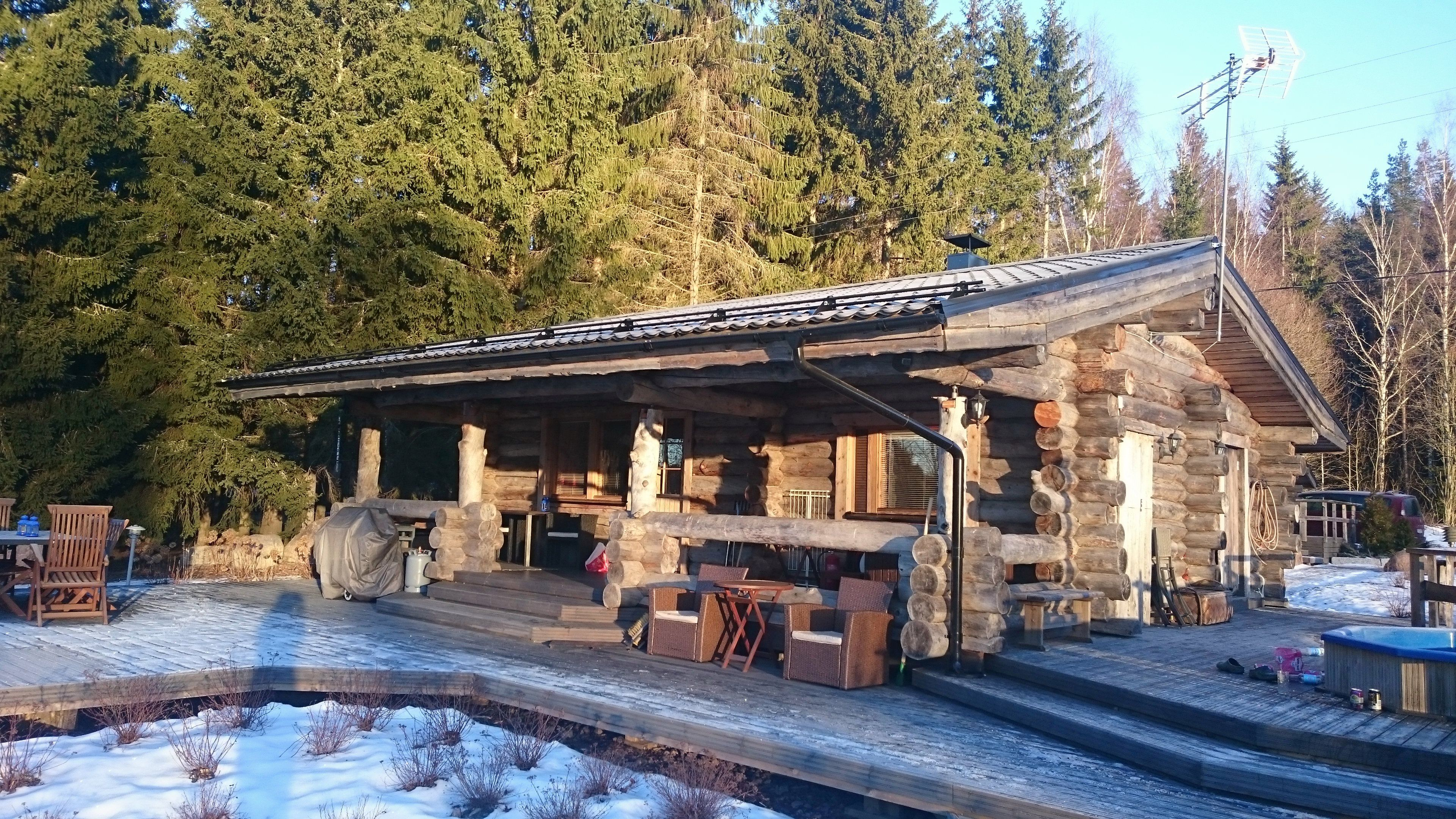 Kelohirsinen mökki joen rannalla Pyhtäällä. Terassilla palju ja ruokailuryhmä kuudelle.